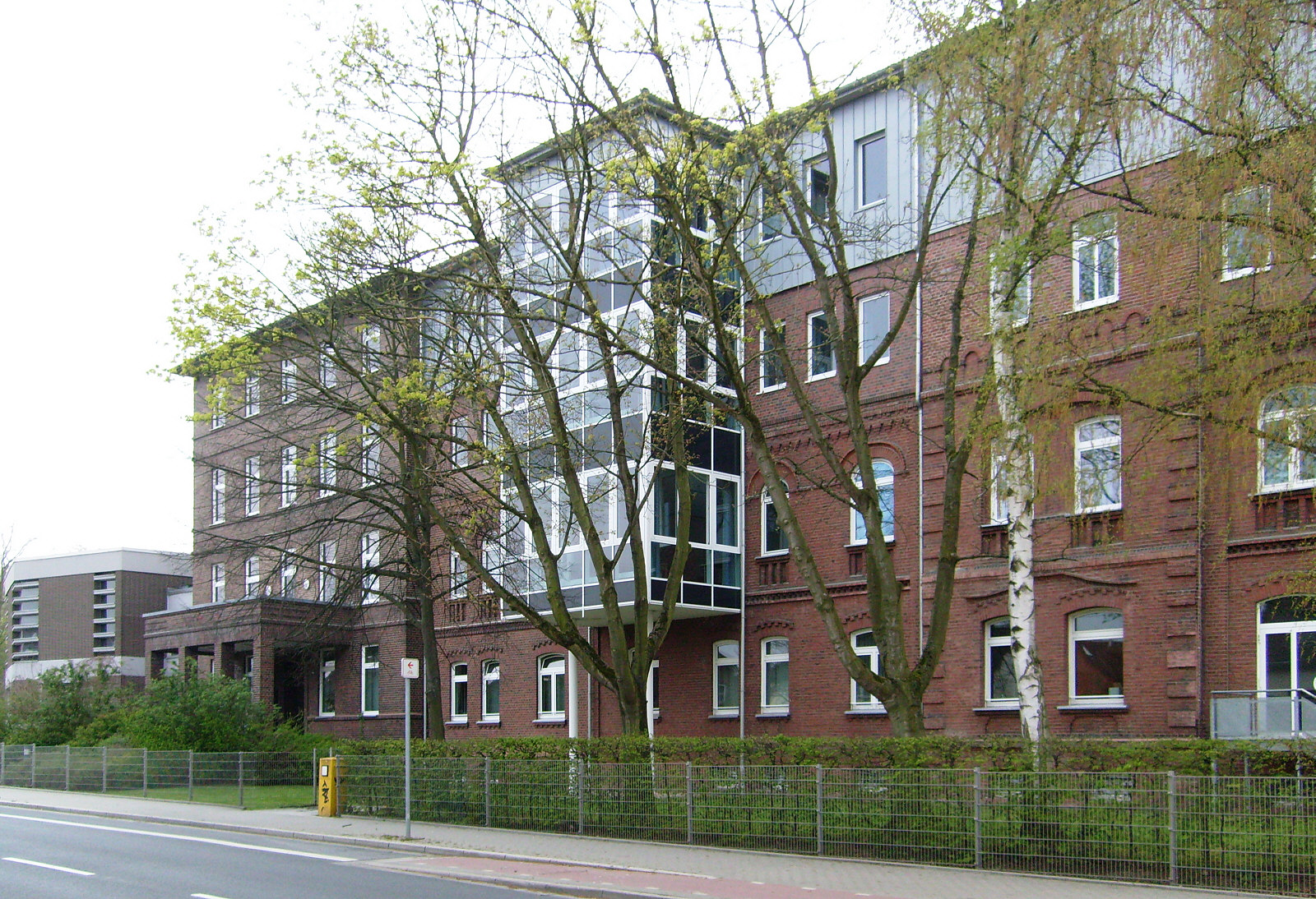 St. Elisabeth-Krankenhaus Dortmund-Kurl. Seit 1994 nach Erweiterung durch ein Altenpflegezentrum Schwerpunkt Innere Medizin/Geriatrie